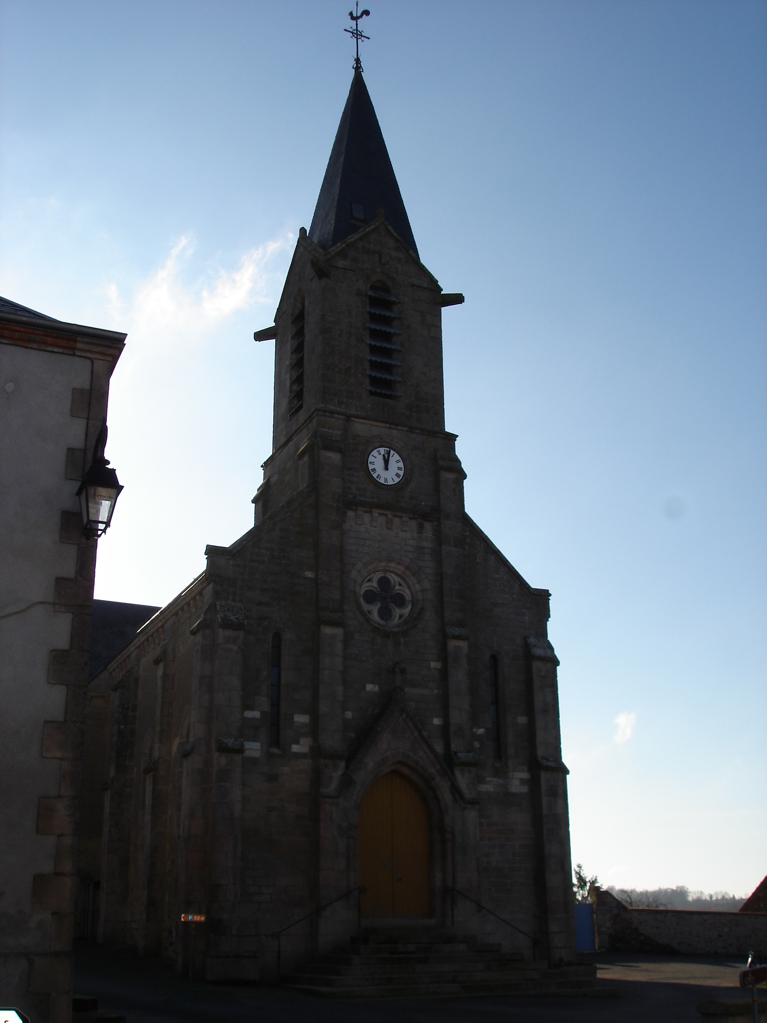 Pérassay (36) : L'église.